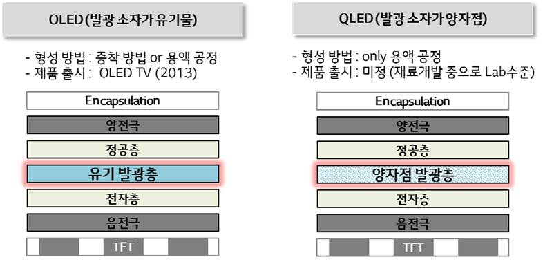 조선말: 구조비교 (OLEDvs.QLED)